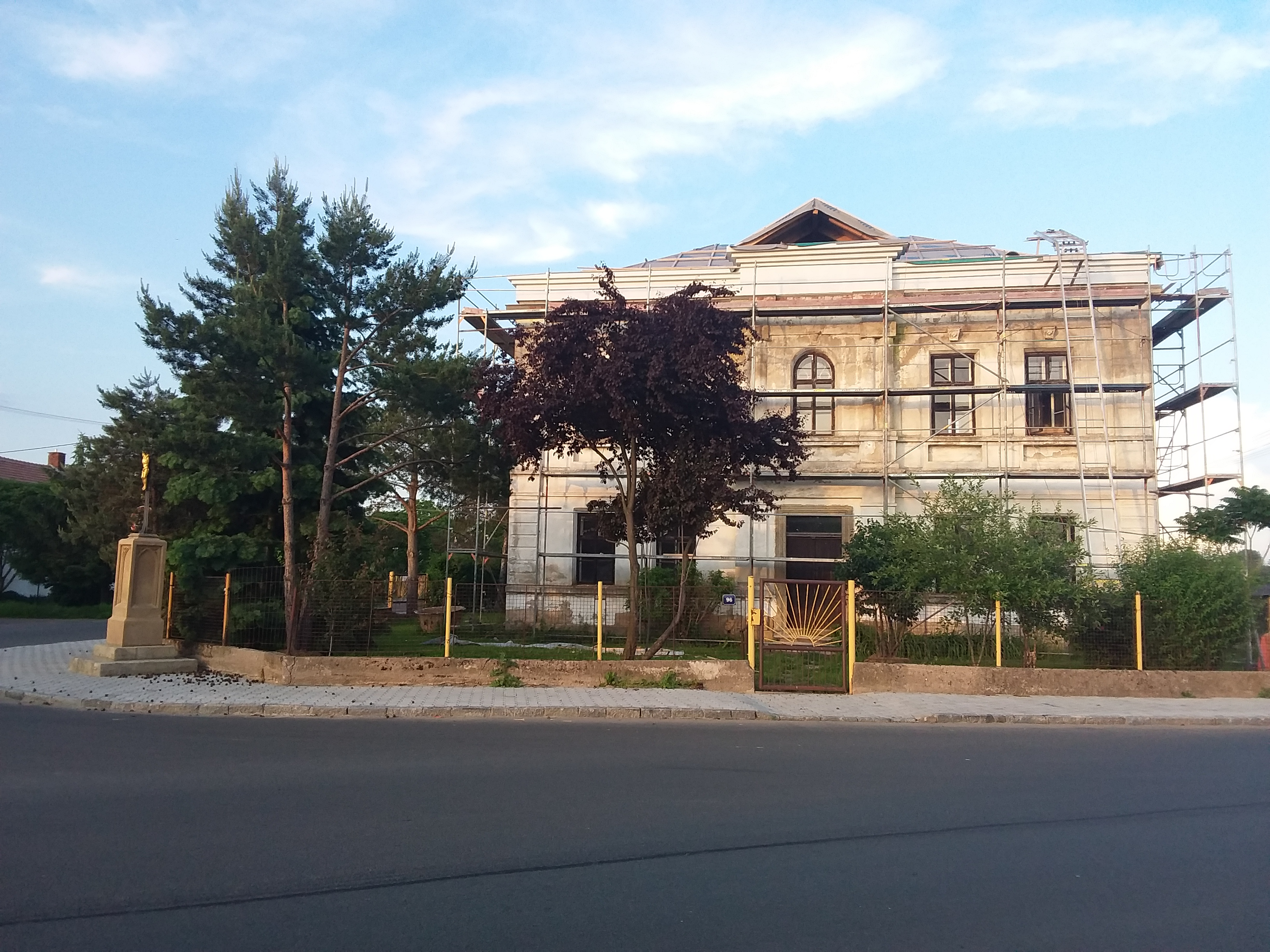 Zámeček Staré Ždánice - Z probíhající rekonstrukce roku 2019